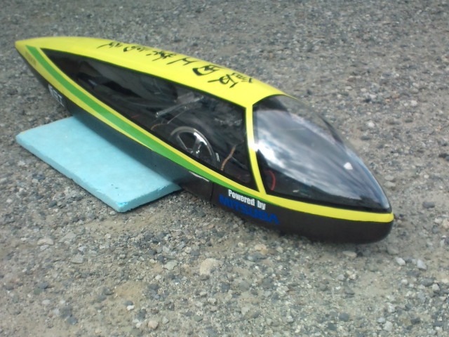 2011Ene-1GP SUKUKAでキャパシタ無しの高校生で2位を受賞した。 読みはウィズダム